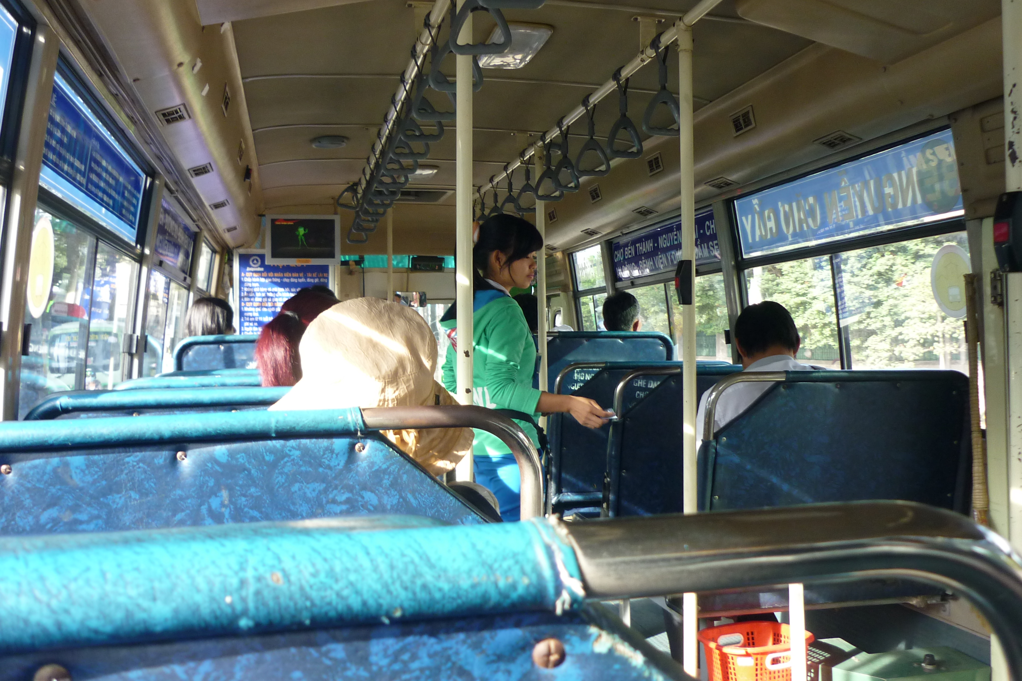 Tiếp viên xe bus tại Thành phố Hồ Chí Minh, Việt Nam